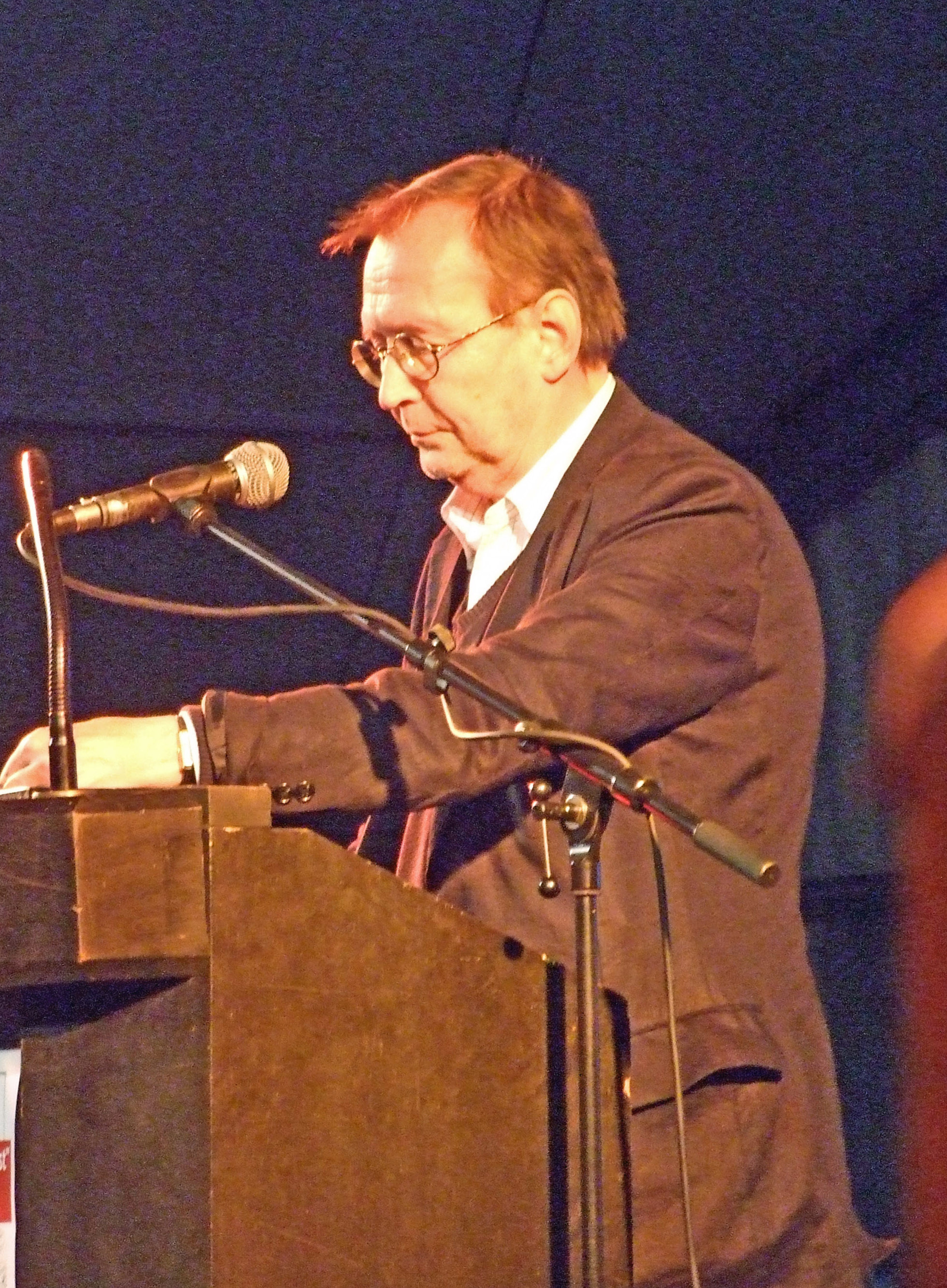 Ingomar von Kieseritzky, während seiner Abschiedsrede vom Stadtschreiberamt in Bergen, 2007